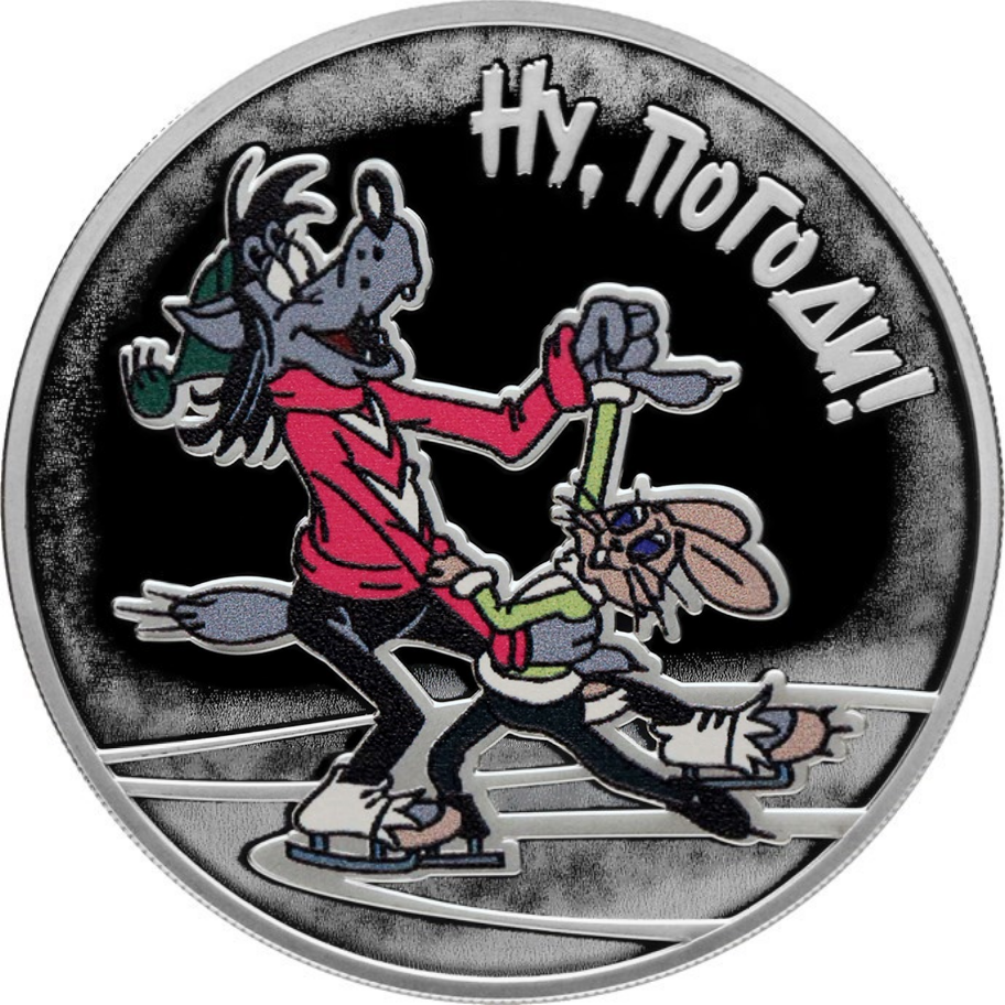 Монета Банка России, «Ну, погоди!». 3 рубля, серебро, реверс, пруф. Цветное изображение сцены из мультфильма «Ну, погоди!», справа вверху – надпись: «НУ, ПОГОДИ!». Чеканка — Санкт-Петербургский монетный двор. Художник: А.А. Брынза. Скульптор: компьютерное моделирование.